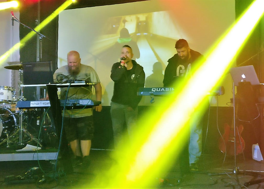 NOVA-SPES während des Soundchecks zum E-Only-Festival 2019 in Leipzig. (Guido Mann, Matthias Hübner, Peter Walter v.l.nr.)